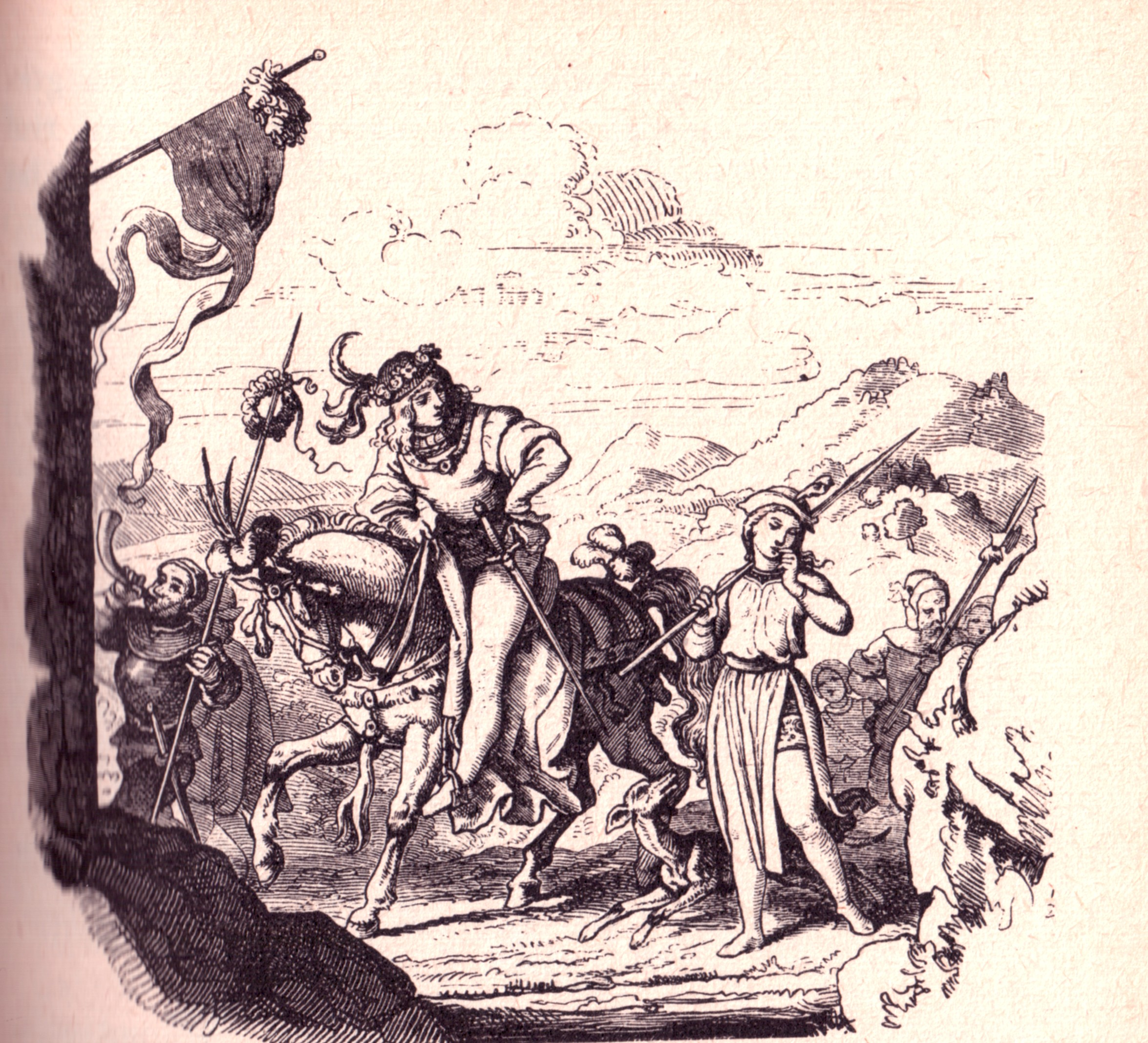 Holzschnitt von Ludwig Richter zum Märchen Siebenschön